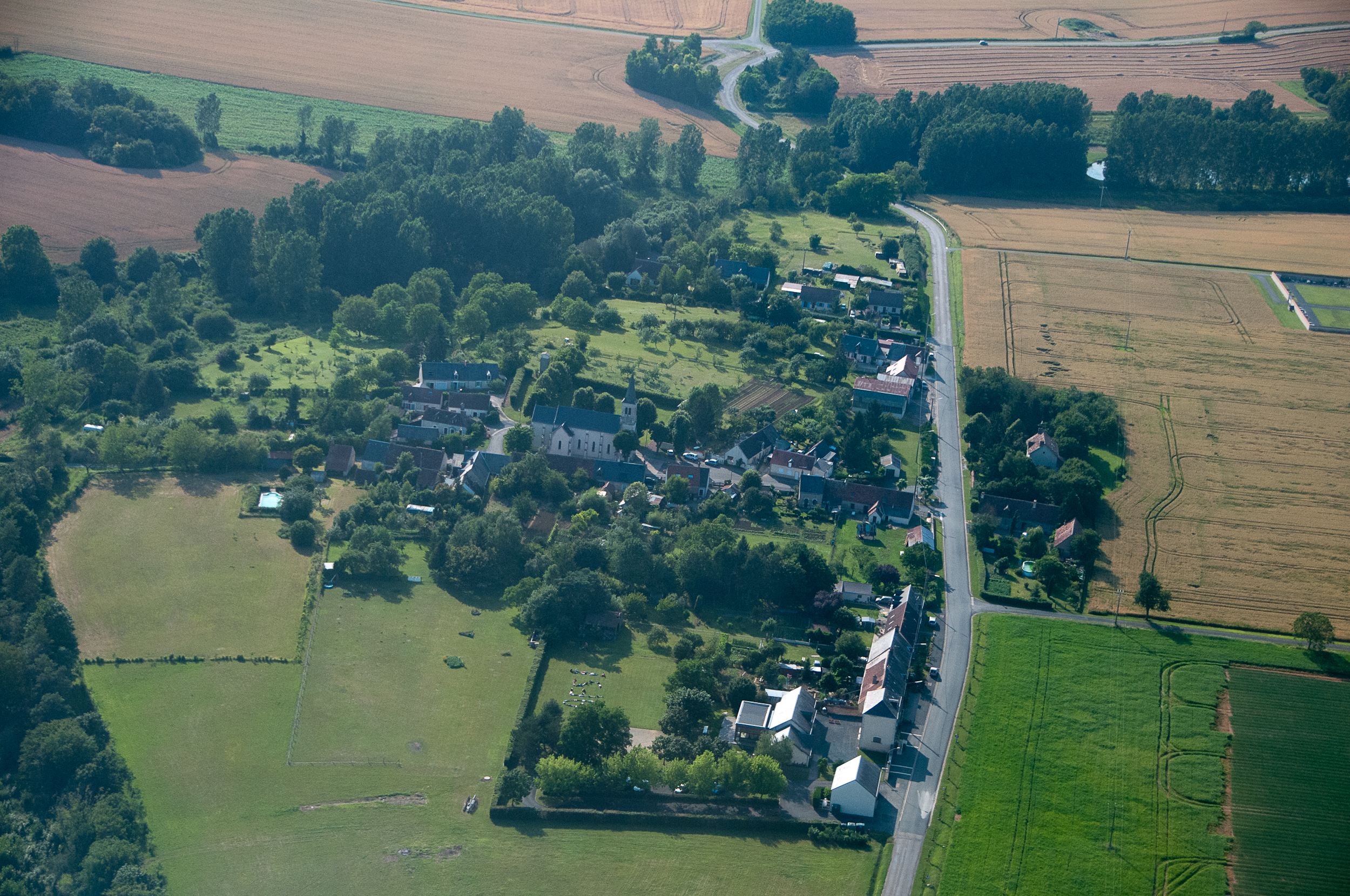 Photographie prise d'avion au dessus de Sainte-Fauste le 30/06/2012. Côté Est du village.